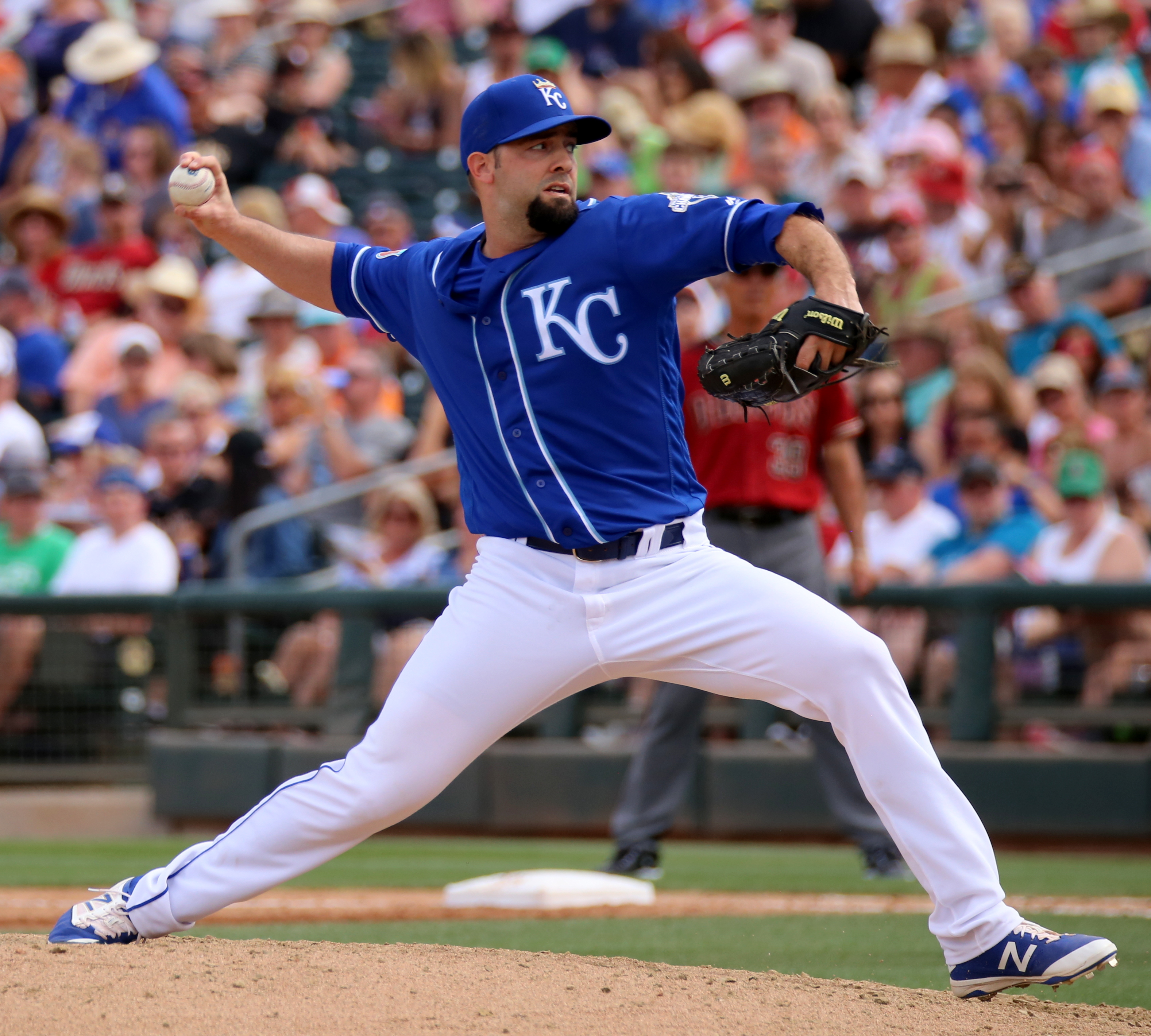 Dillon Gee